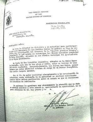 Carta del cónsul estadounidense, enviada en 1938 al alcalde de Pradejón, interesándose por los inmuebles incautados a los protestantes.